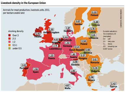 Unité de bétail par hectare